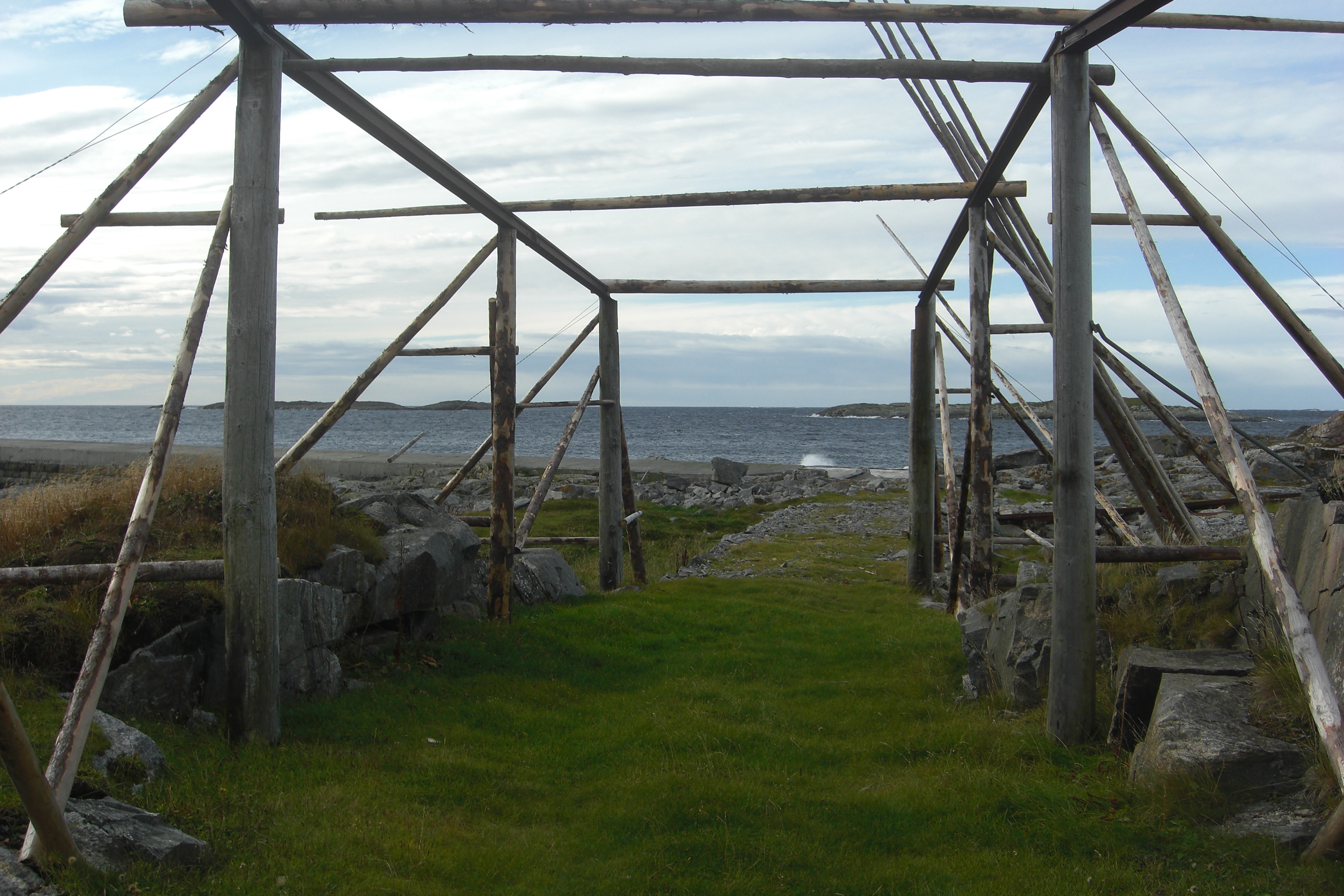 Nordøyan fiskevær er trolig et av norges eldste fiskevær, med dokumentert bosetning tilbake til 1521. Alegget ble fredet i 1996, og omfatter 11 bygninger, veg, fiskehjeler og moloer. Bildet er tatt fra der veien slutter,og mot havet i sør.